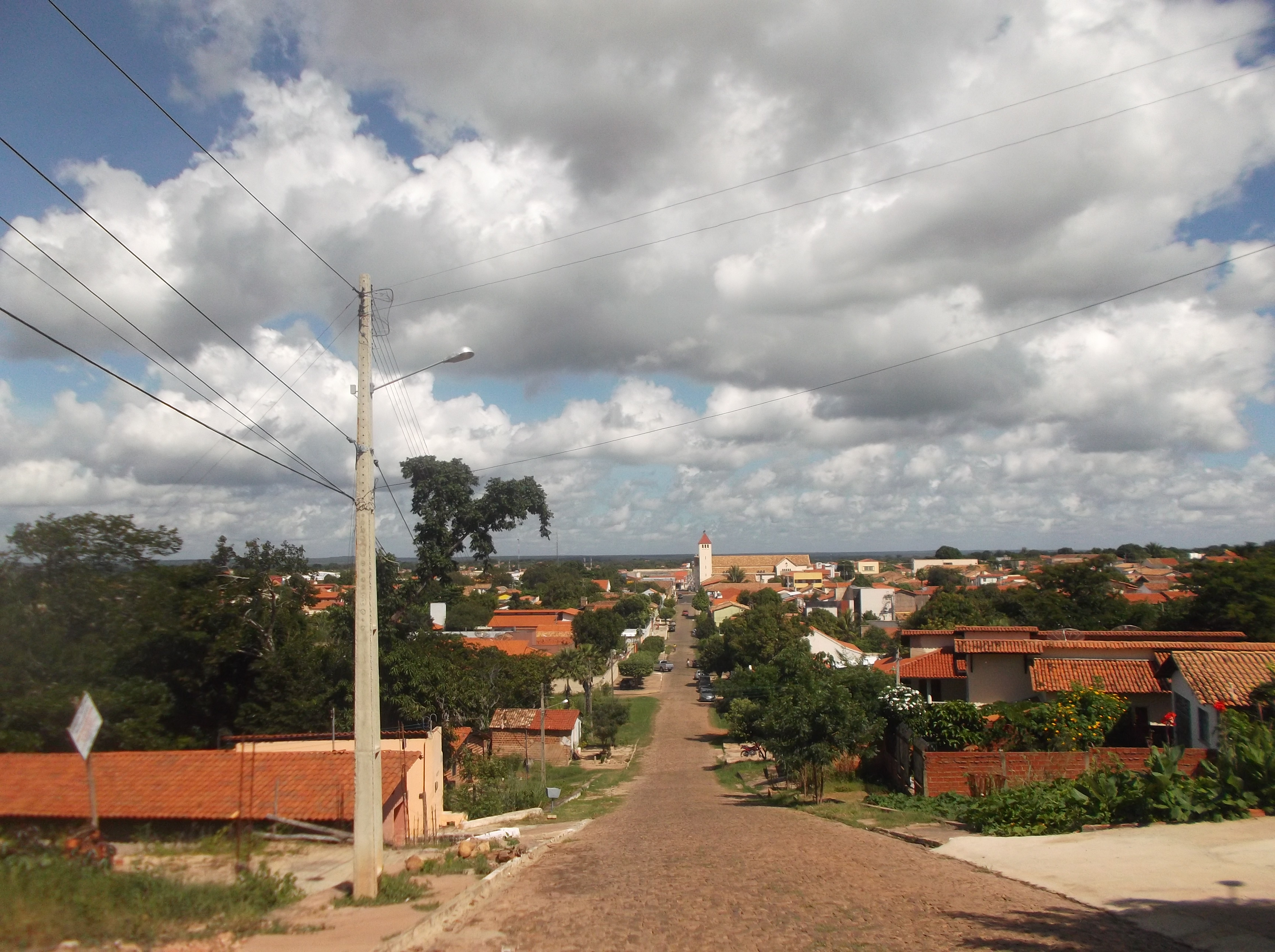 Vista de um setor de Piripiri.